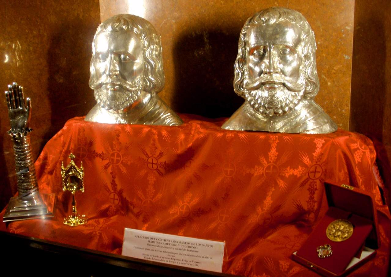 Bustos-relicarios de los santos mártires Emeterio y Celedonio, en la parroquia (cripta) del Santísimo Cristo de la Catedral de Santander (Cantabria)